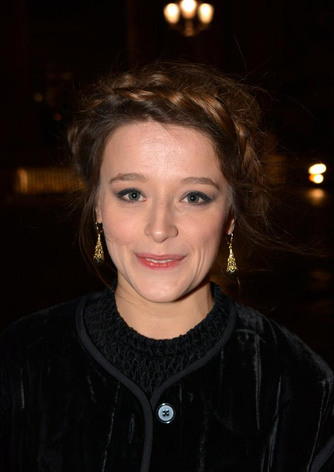 Adeline d'Hermy au dîner des révélations des César du cinéma